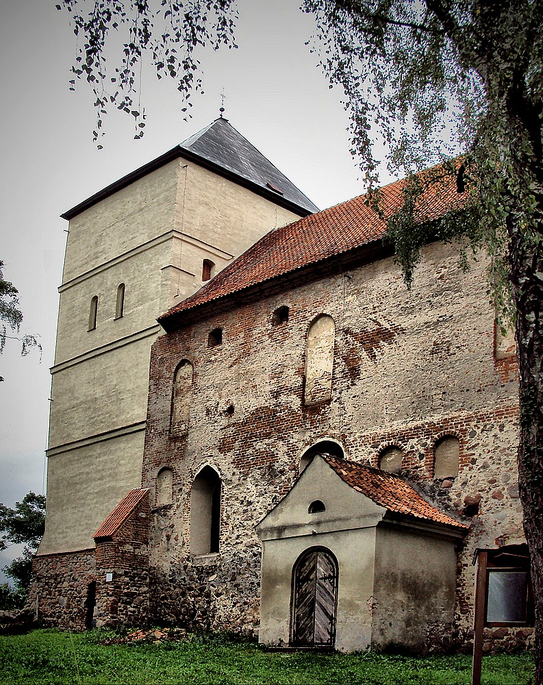 Kościół w Bezławkach